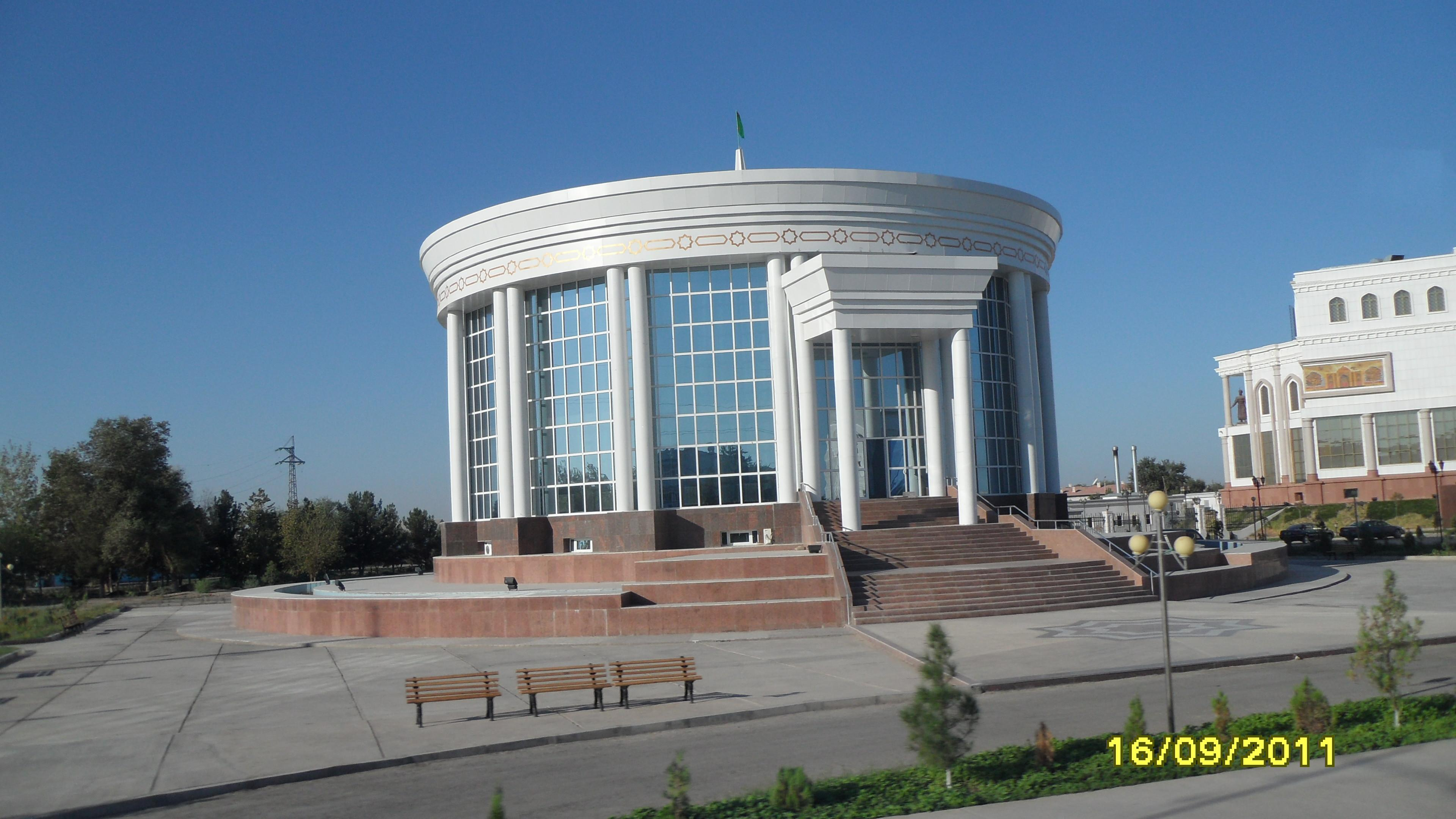 Gebäude in Mary, Turkmenistan